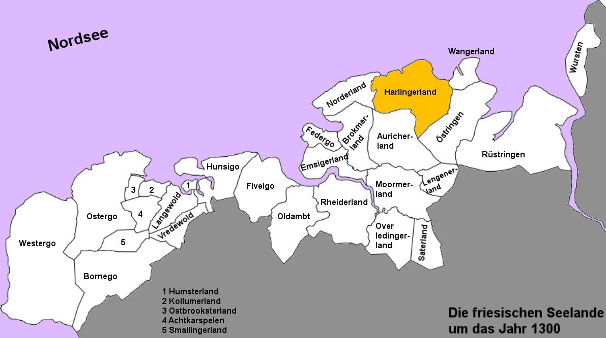 Karte der freien friesischen Seelande (Landesgemeinden) von der Zuiderzee bis zur Weser in den Grenzen um das Jahr 1300. Harlingerland hervorgehoben. (Karte ohne Inseln.)